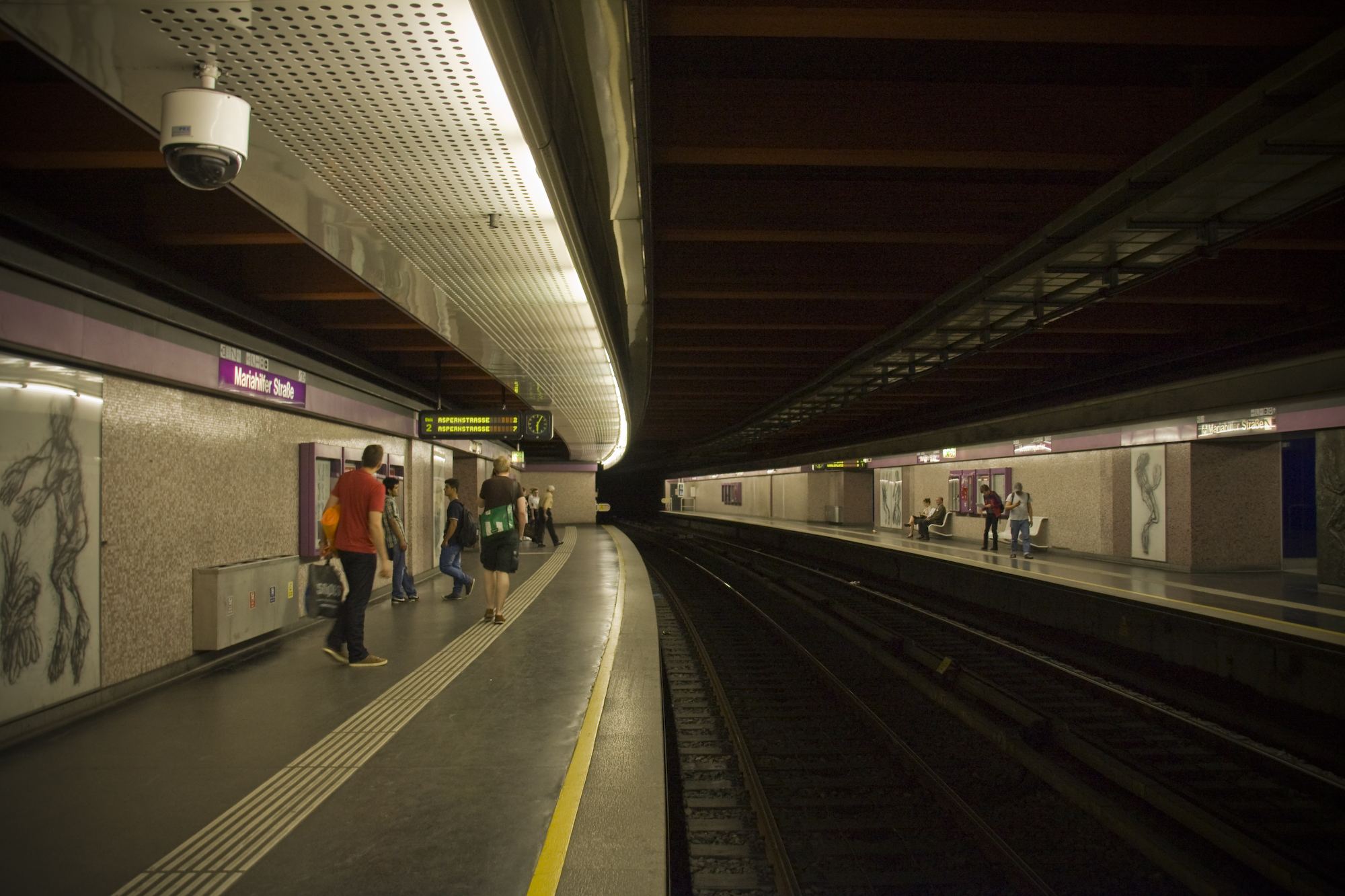 Vienna Underground